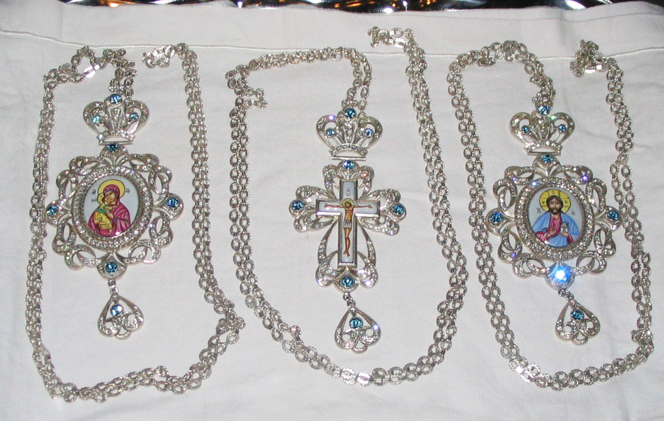 Suomessa vierailleen Washingtonin arkkipiispa Hermanin piispalliset tunnukset Uspenskin katedraalissa juuri ennen palveluksen alkua